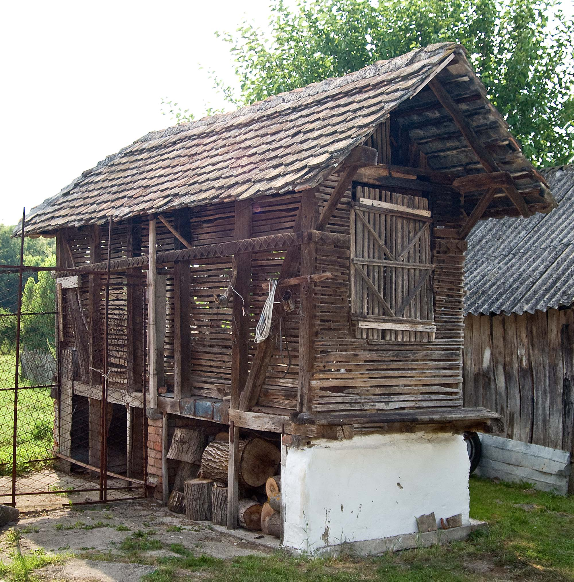 Кош за кукуруз у селу Бргуле код Уба